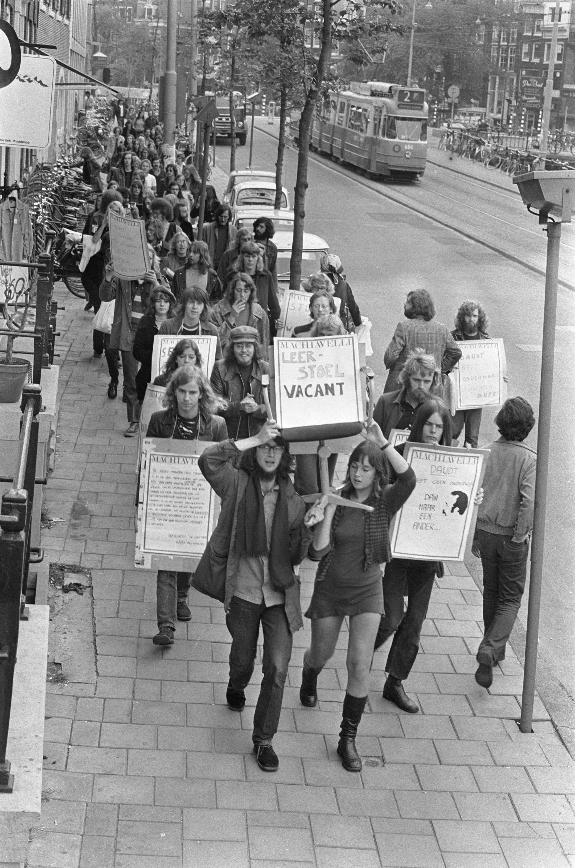 Studenten in de politicologie [aan de Universiteit van Amsterdam] met stoel van stakende prof. Daudt in optocht naar Maagdenhuis, Amsterdam.Datum 26 september 1973